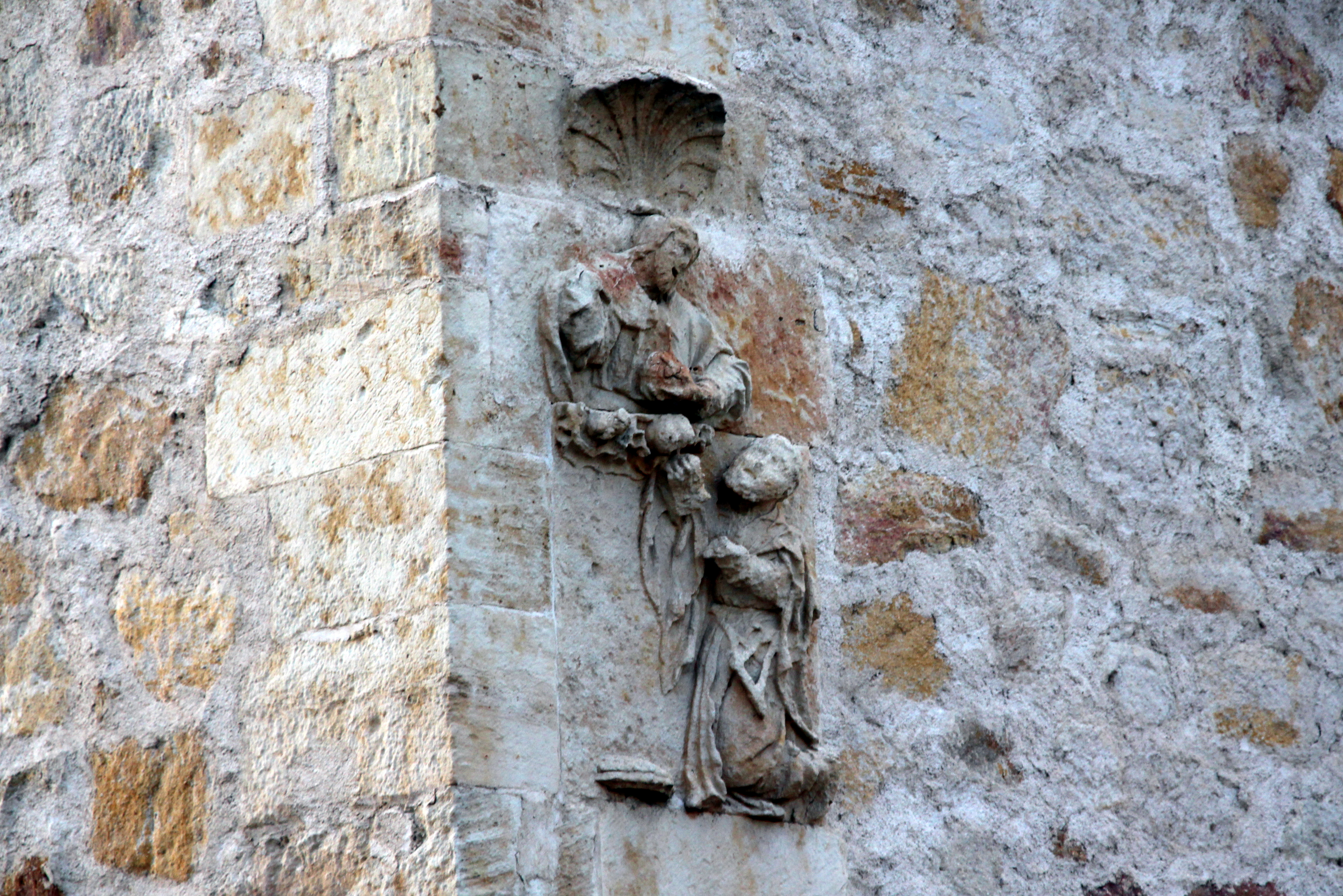 Iglesia de la Trinidad (Iglesia Vieja del Arrabal), Salamanca, España. Un relato anónimo de la primera mitad del siglo XIII cuenta la visión que tuvo Juan de Mata durante la celebración solemne de su primera misa en París,el 28 de enero de 1193: «Juan invitó a su primera misa al obispo de París, al abad de San Victor y a Prevostino, que había sido su maestro. En el momento central de la misa suplicó al Señor que, si era su voluntad, le mostrase en qué orden religiosa podía ingresar con toda seguridad. Y elevando los ojos al cielo, se le apareció el mismo Señor sosteniendo en sus manos a dos hombres encadenados por las tibias: uno negro y feo, y el otro blanco y pálido». de la WIKI